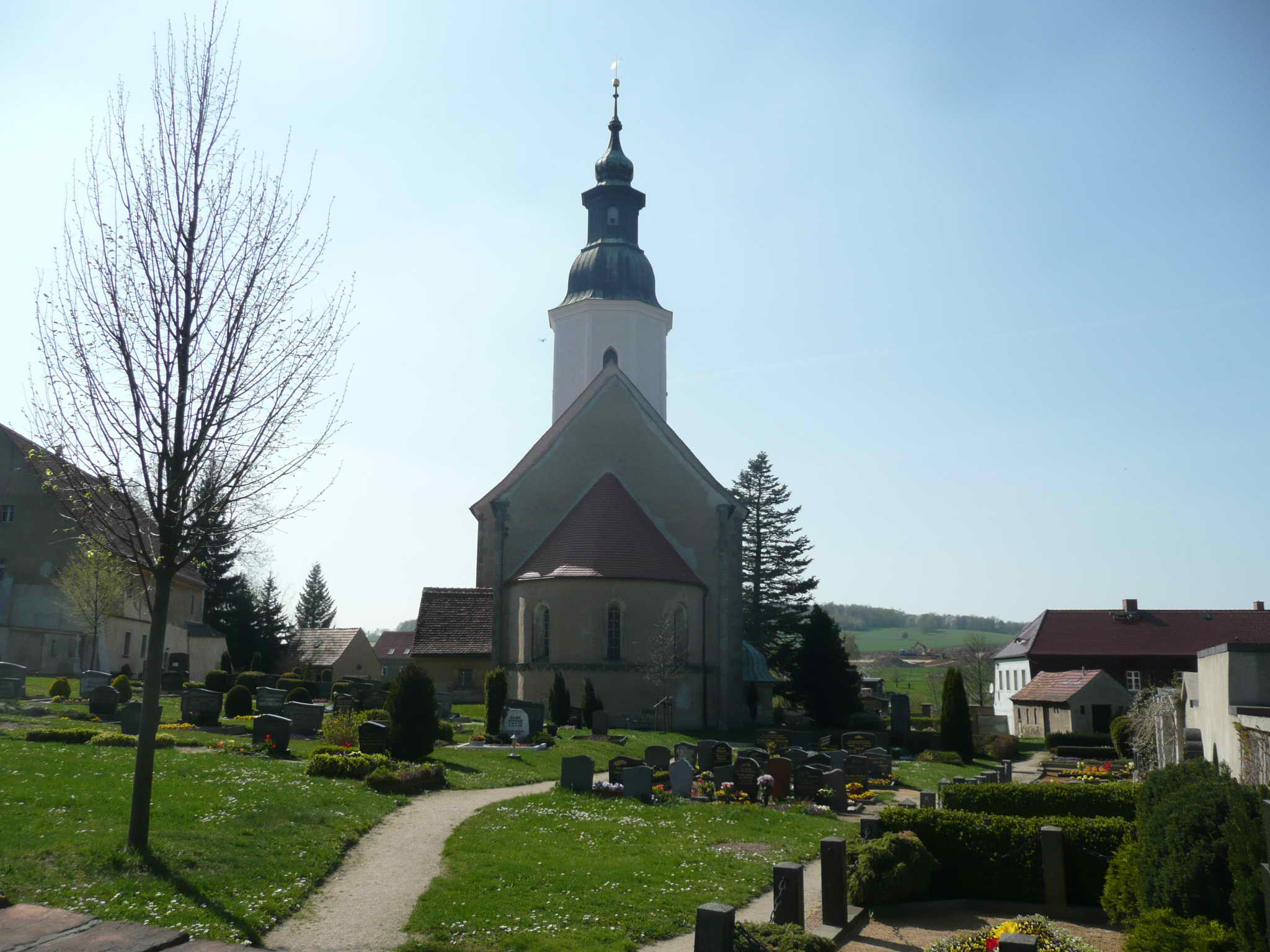 Markersdorf-Friedersdorf, Kirche St.Ursula, 1663, Blick auf Friedhof u Chor